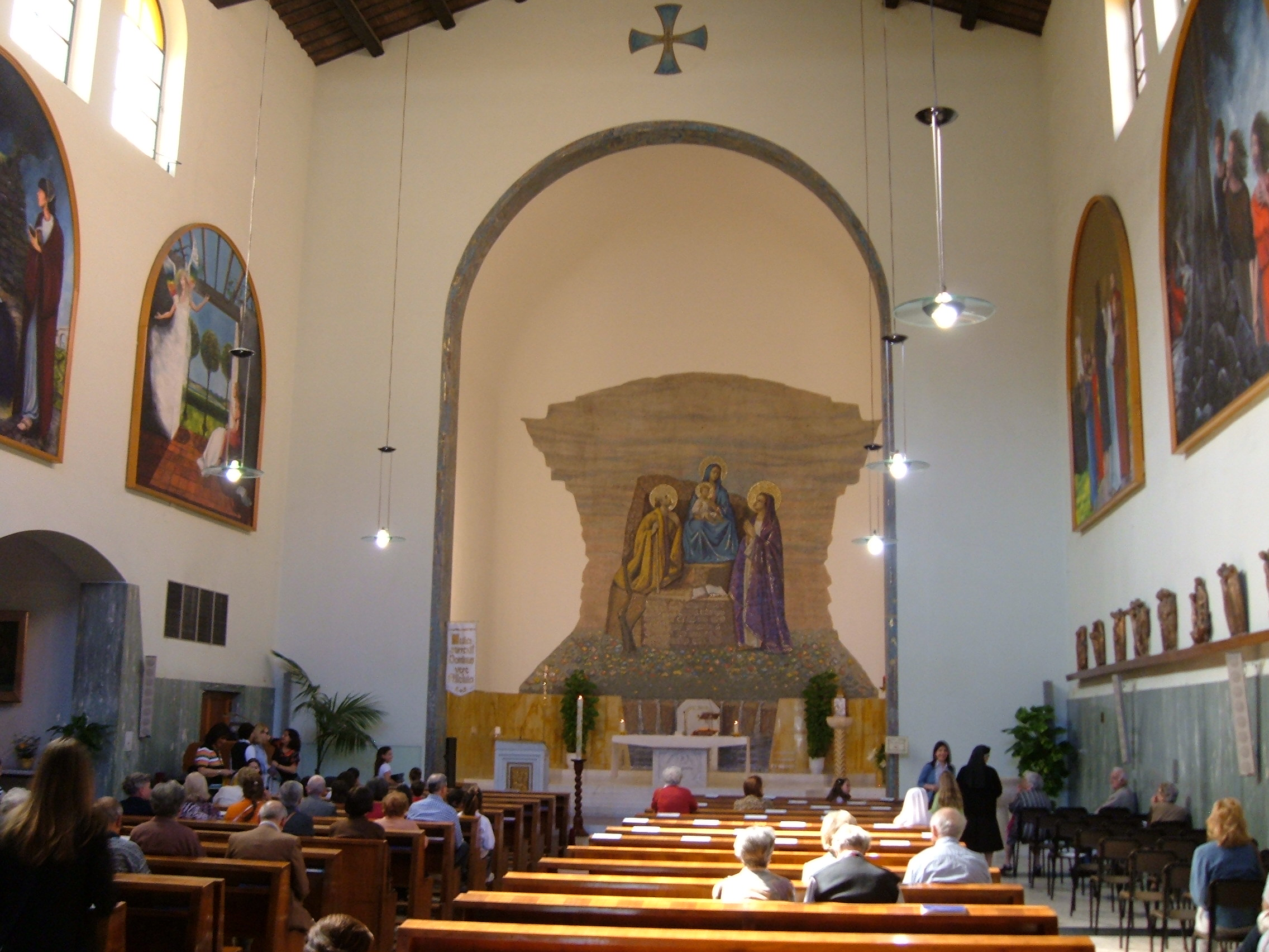 Chiesa di Santa Paola Romana (Rome): interno.